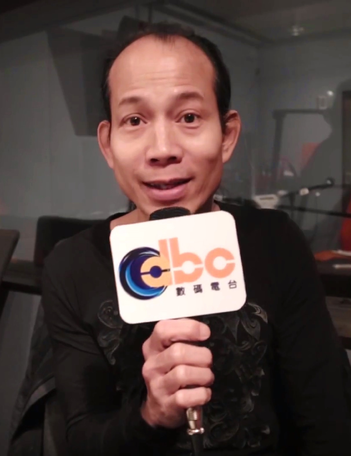 中文（香港）: 香港著名堪輿學家，自稱「現代賴布衣」